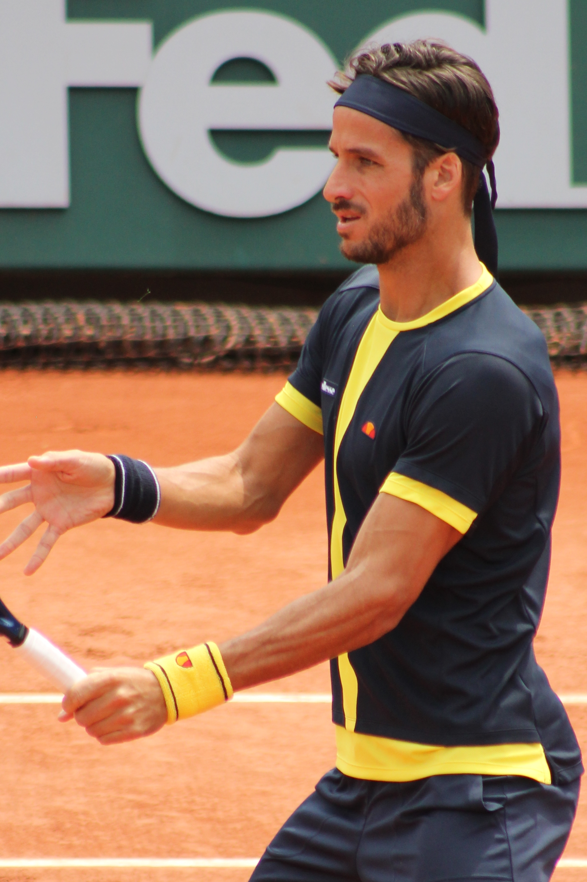 Lopez F. RG16 (7)